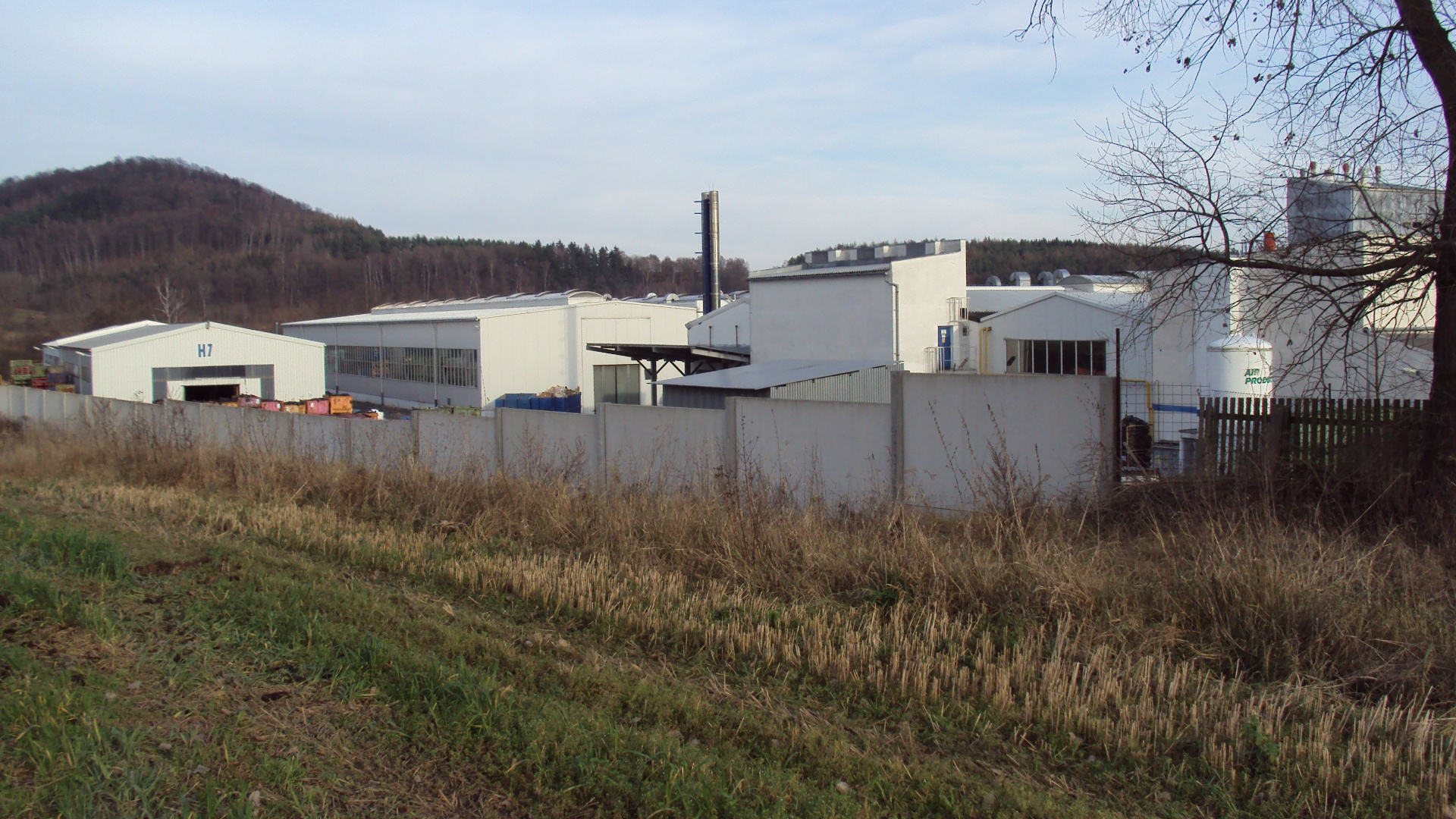 Areál firmy IAC na okraji Nových Zákup